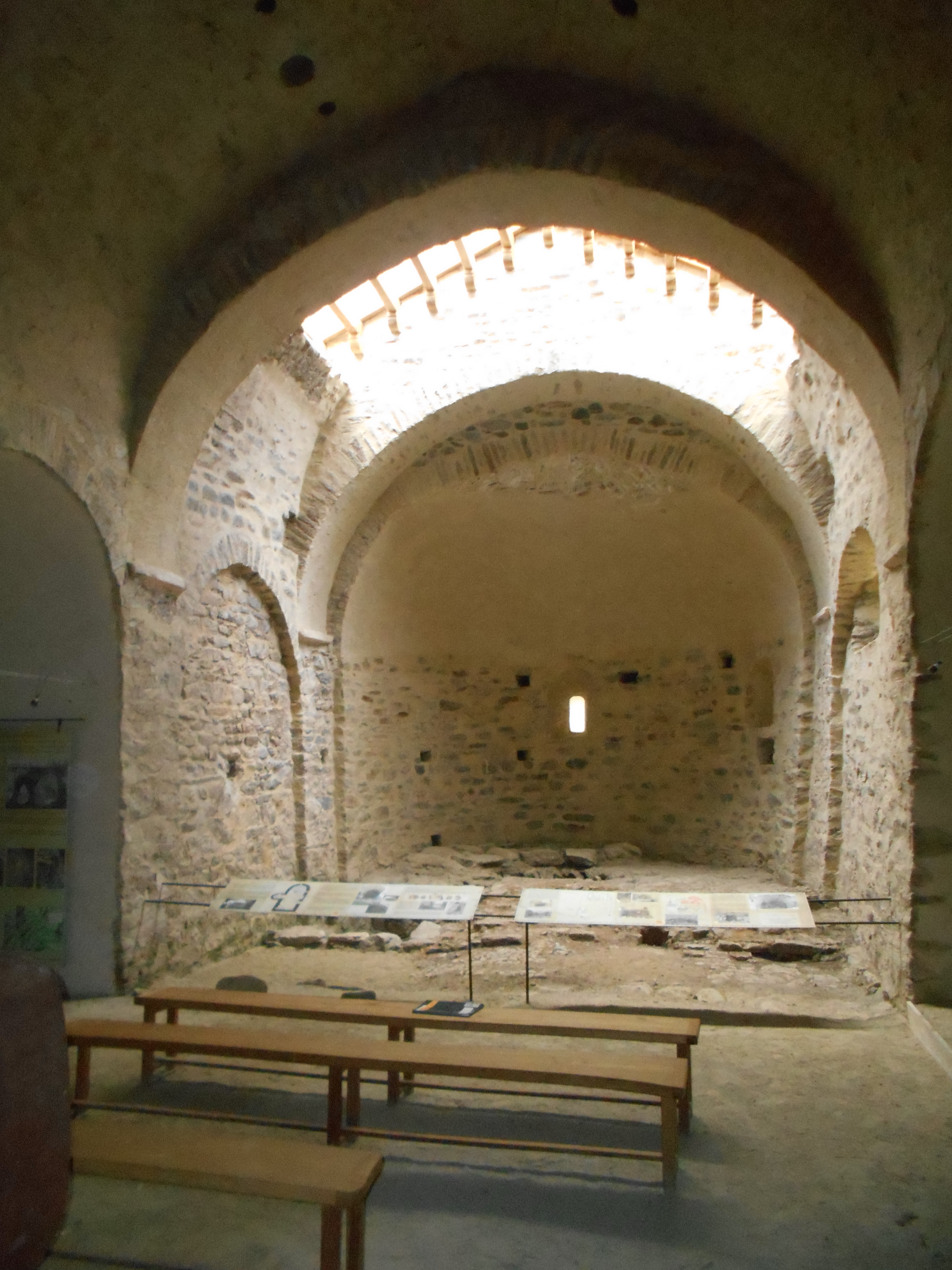 Interior de Sant Andreu de Vallestàvia (església vella).